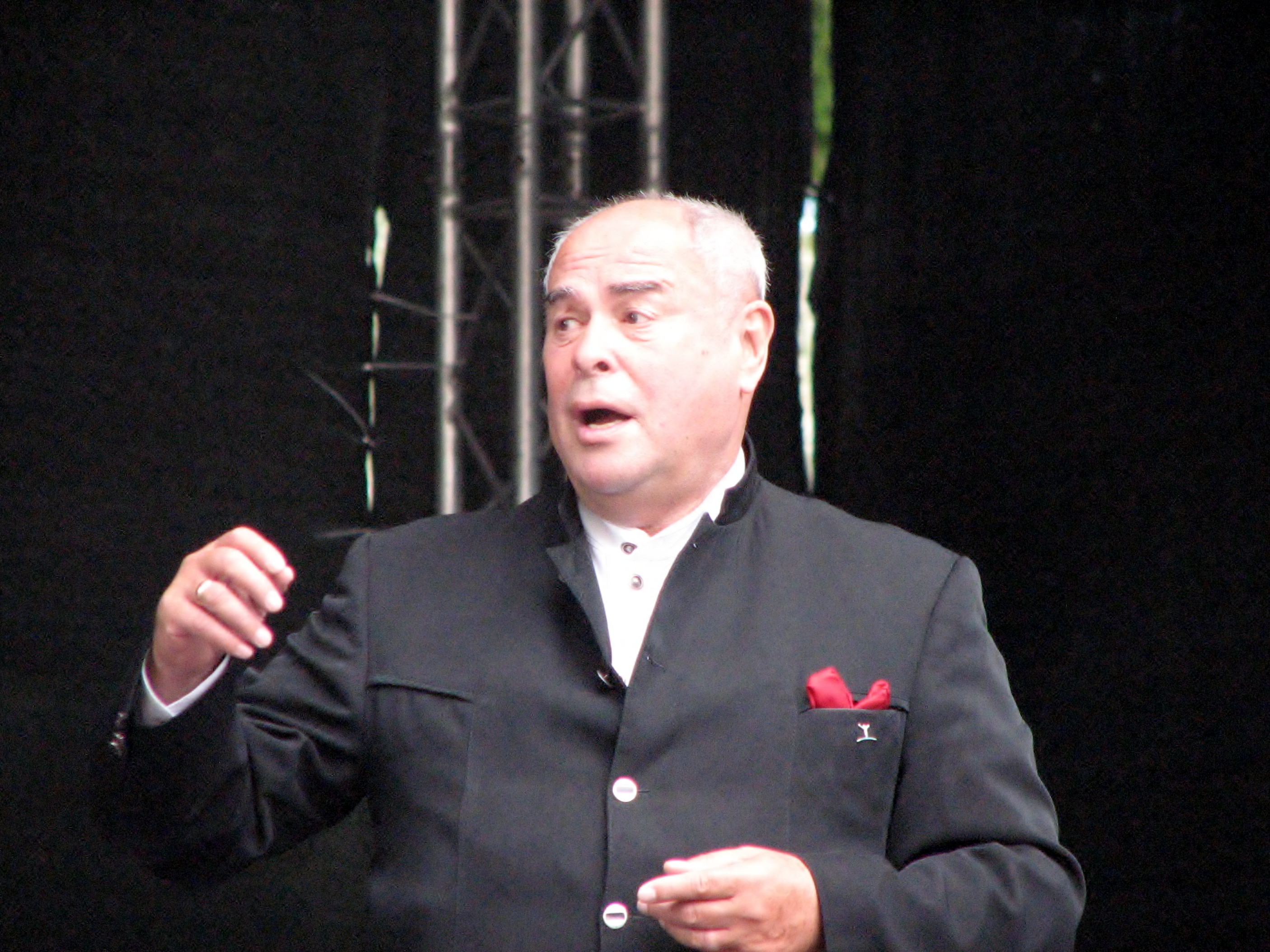 Eri Klas juhatamas orkestrit Rahvusooper Estonia 107. hooaja avamisel